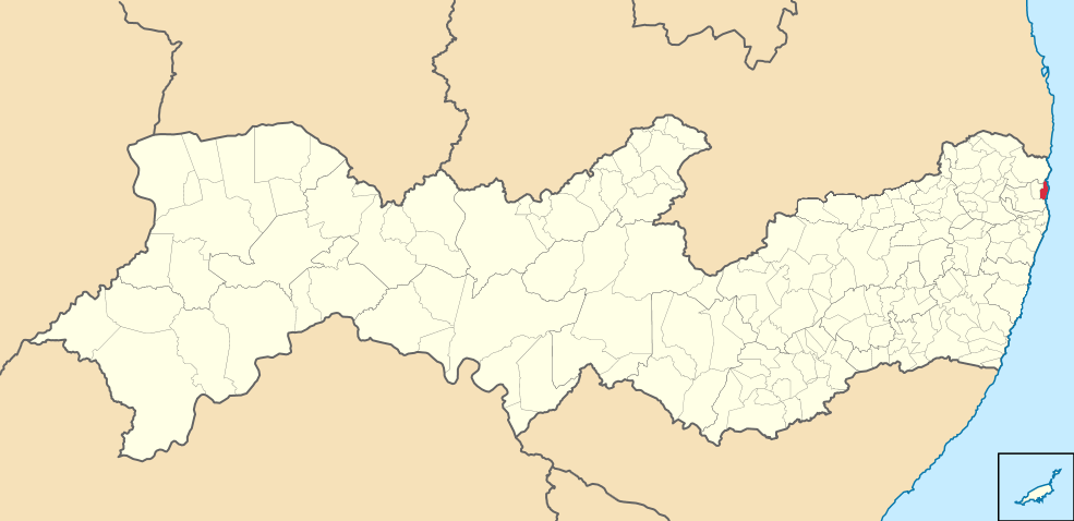 Mapa de Ilha de Itamaracá (2)